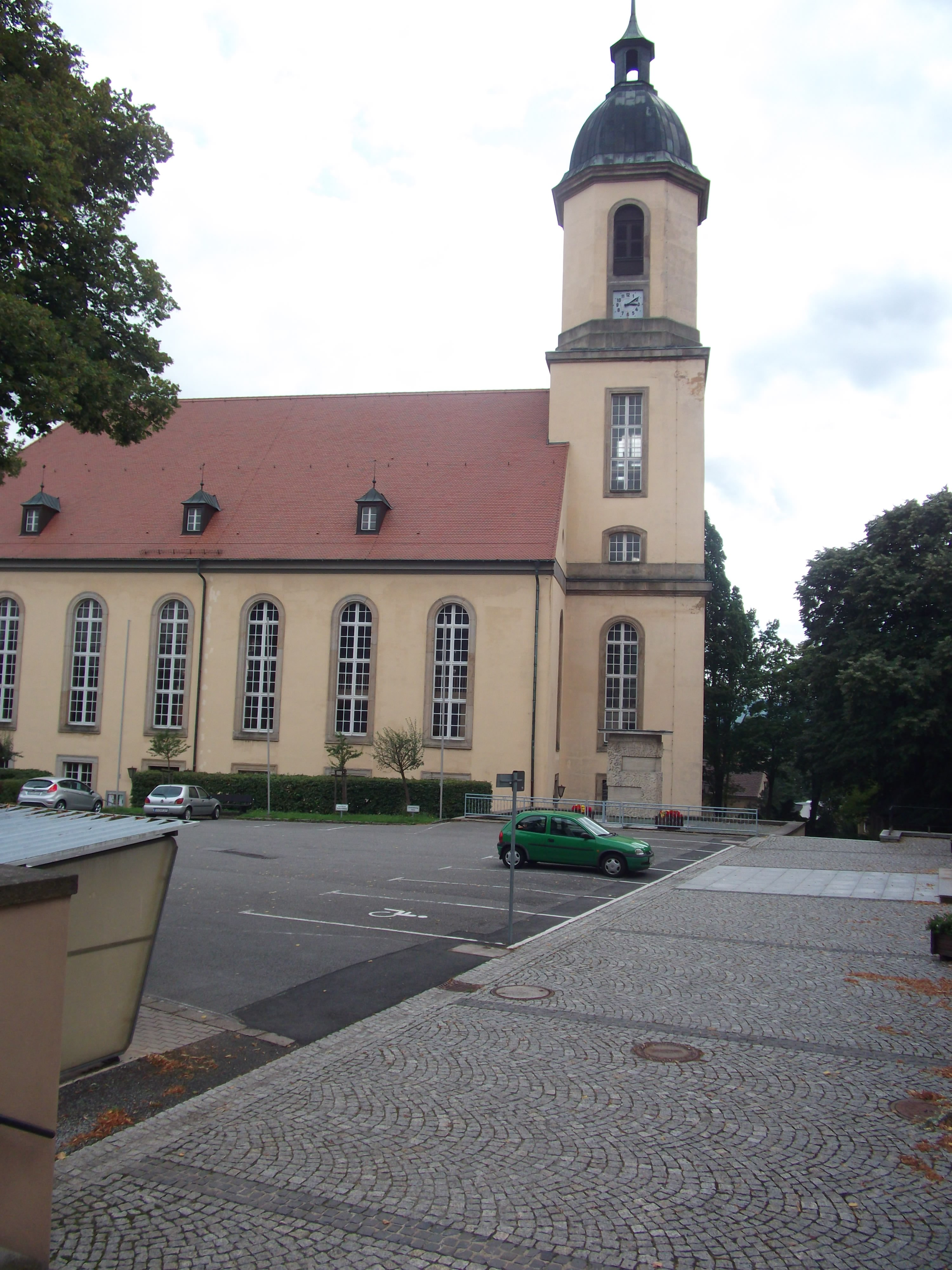 Seifhennersdorfer Kreuzkirche